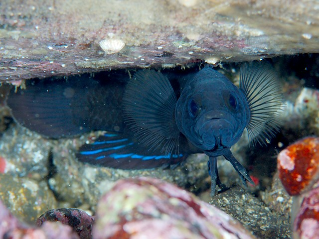 タナバタウオ Plesiops coeruleolineatus